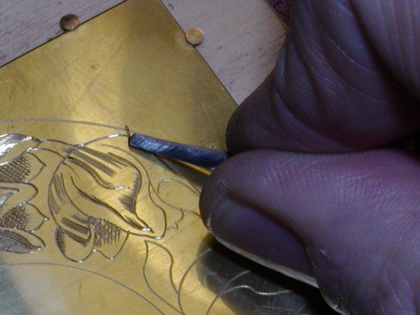 De hangraveur aan het werk.